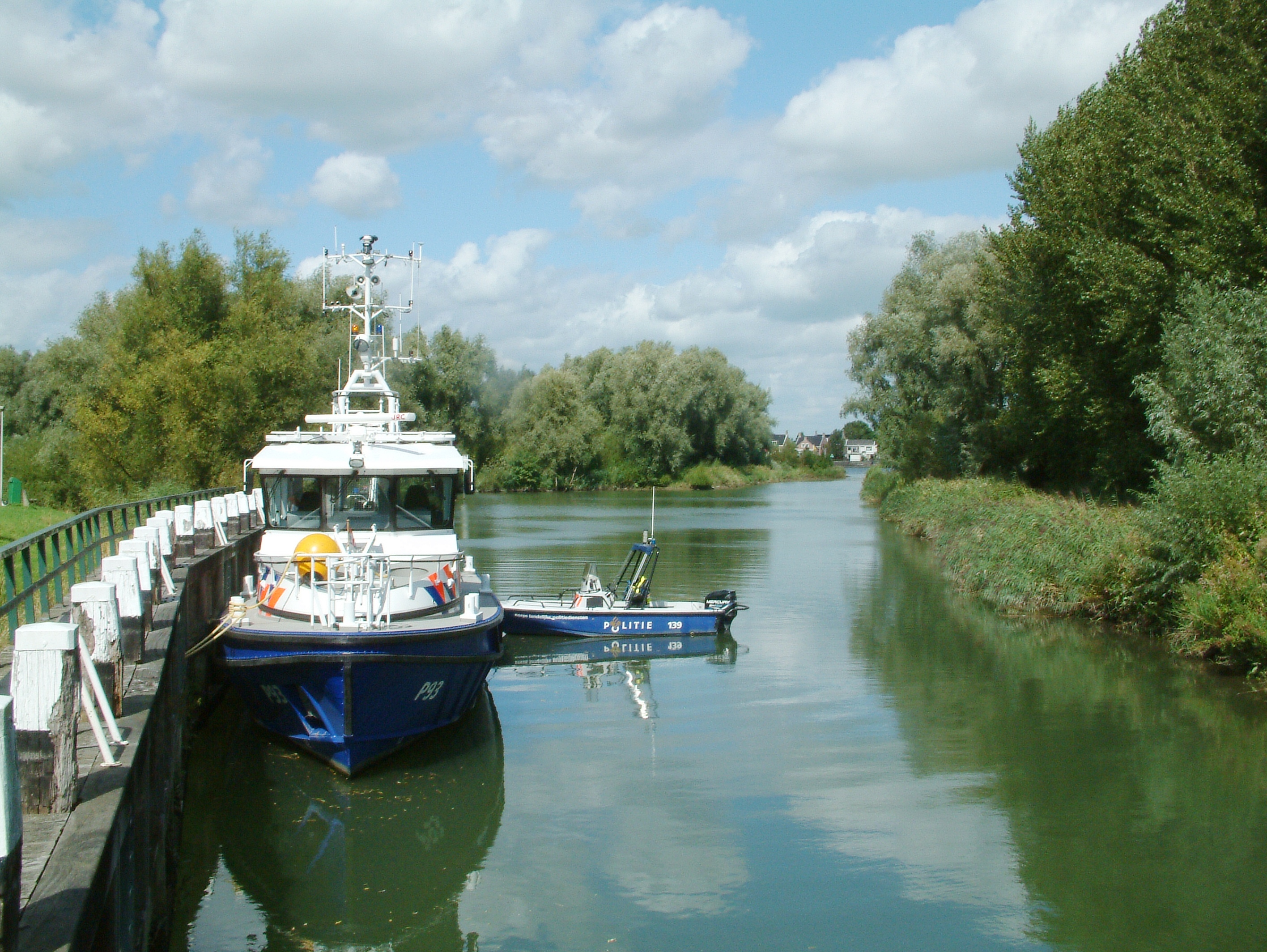 De Helsluis tusssen de Beneden Merwede tegenover Sliedrecht en de Helsloot